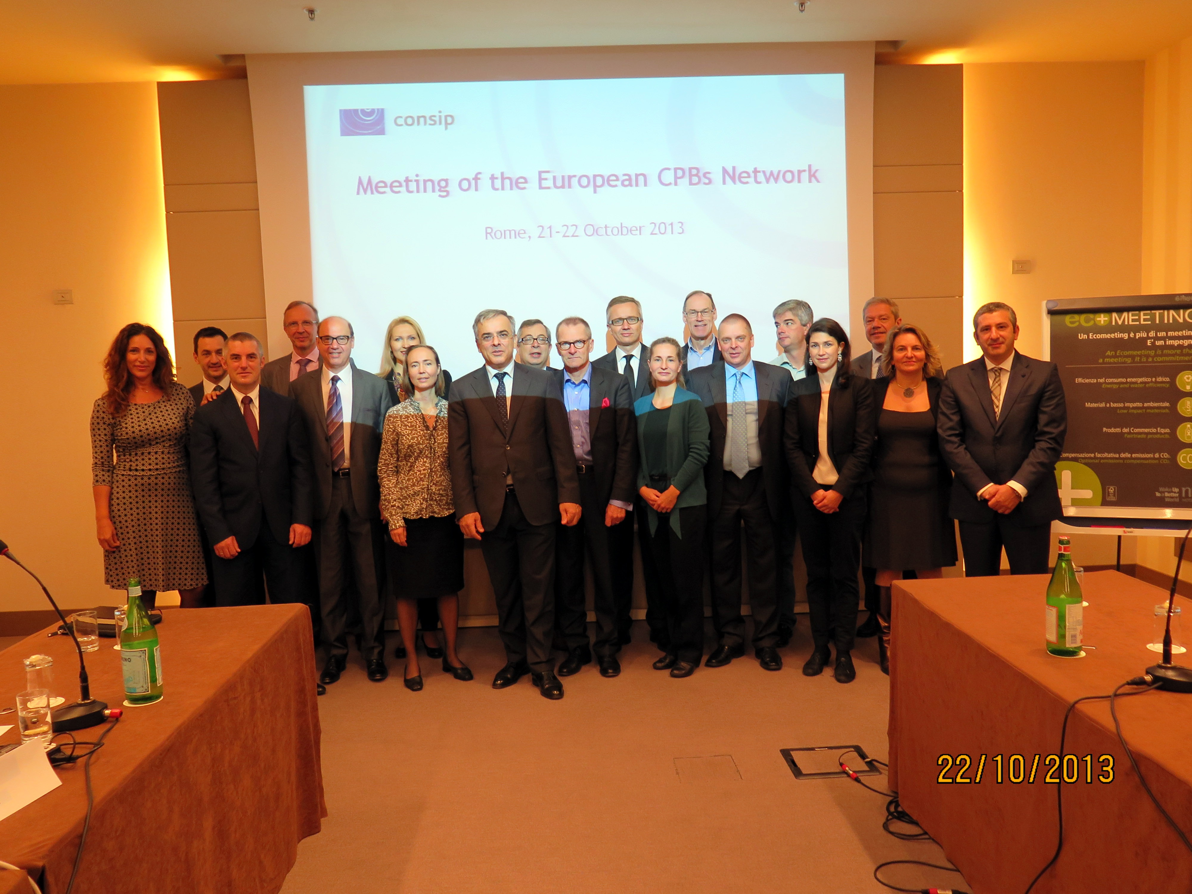 European CPM meeting in Rome, 2013